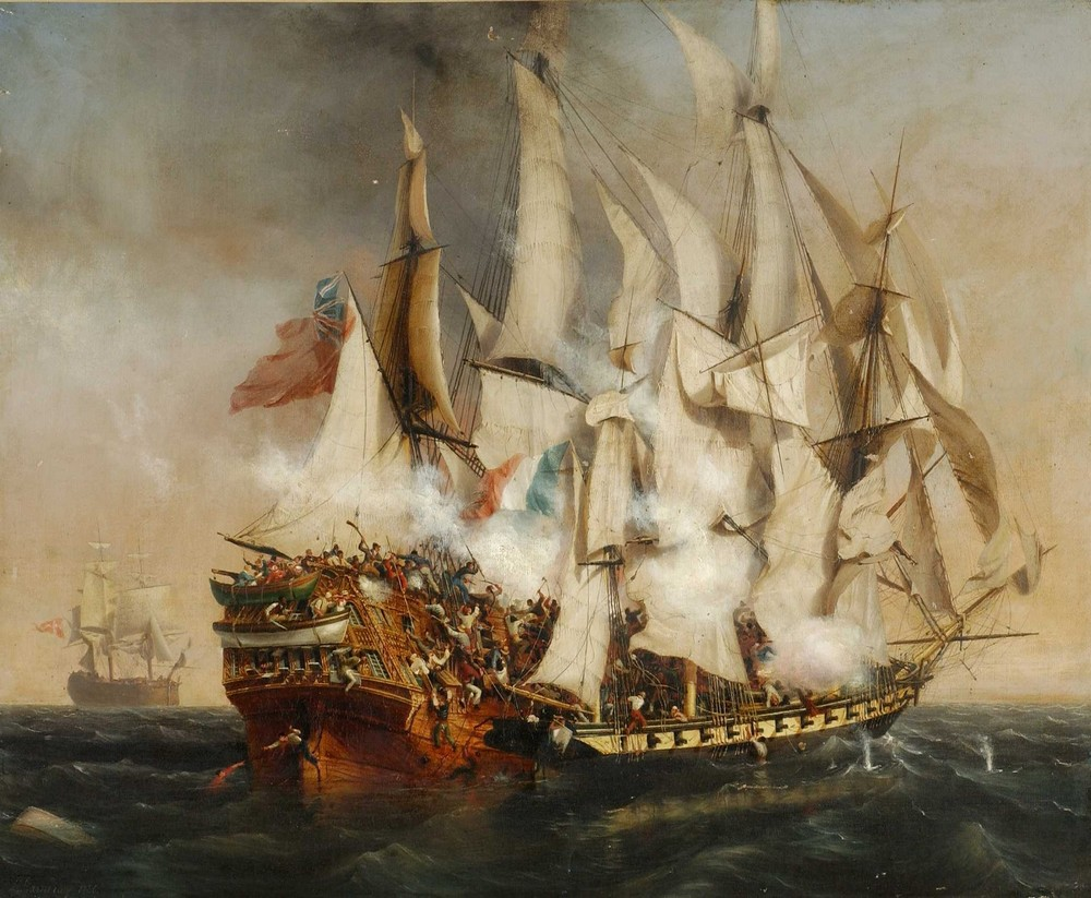 Combat naval - l'abordage du Kent de Garneraylabel QS:Lfr,"Combat naval - l'abordage du Kent de Garneray"